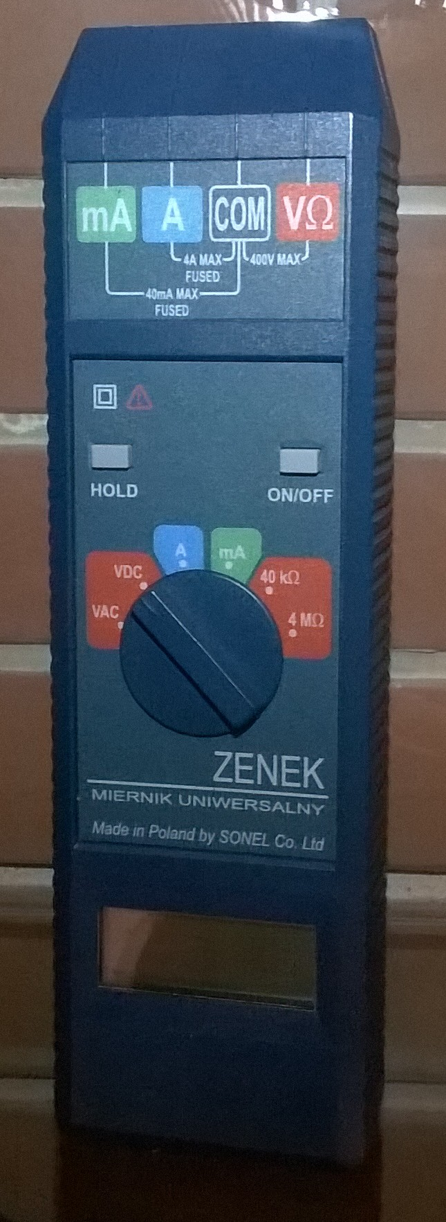 Limitowana edycja - miernik nigdy nie był w sprzedaży, pojedyncze sztuki zostały wykorzystane jako nagrody dla uczestników jednej z konferencji SONEL-a.